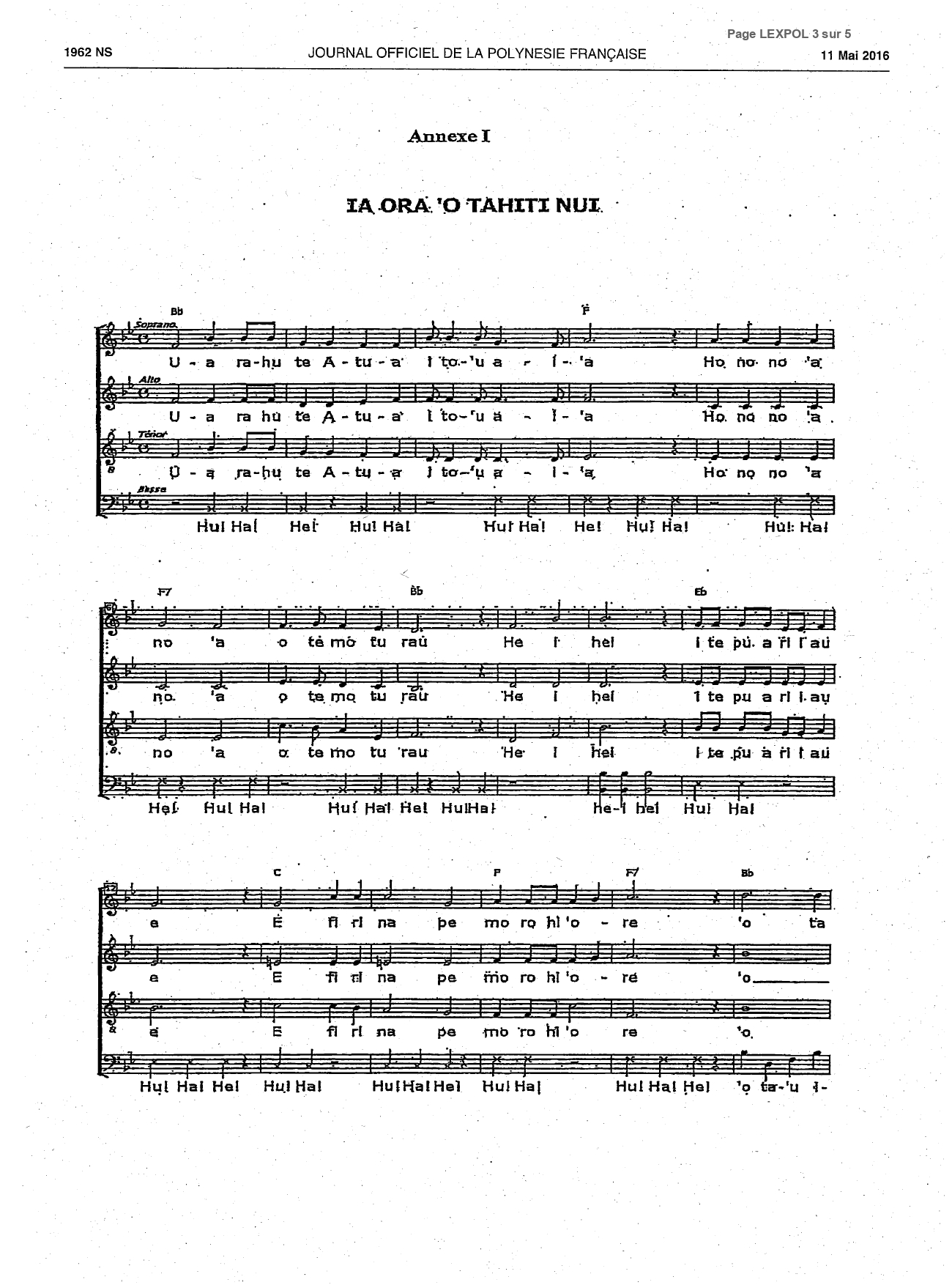 1ère page de la partition de l'hymne territorial de la Polynésie française, publié dans la loi du Pays 2016-14.